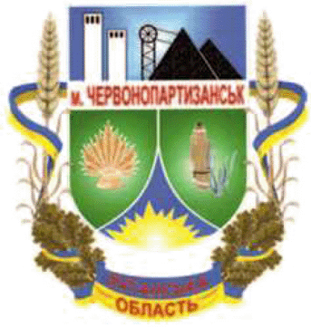 Герб Червонопартизанська